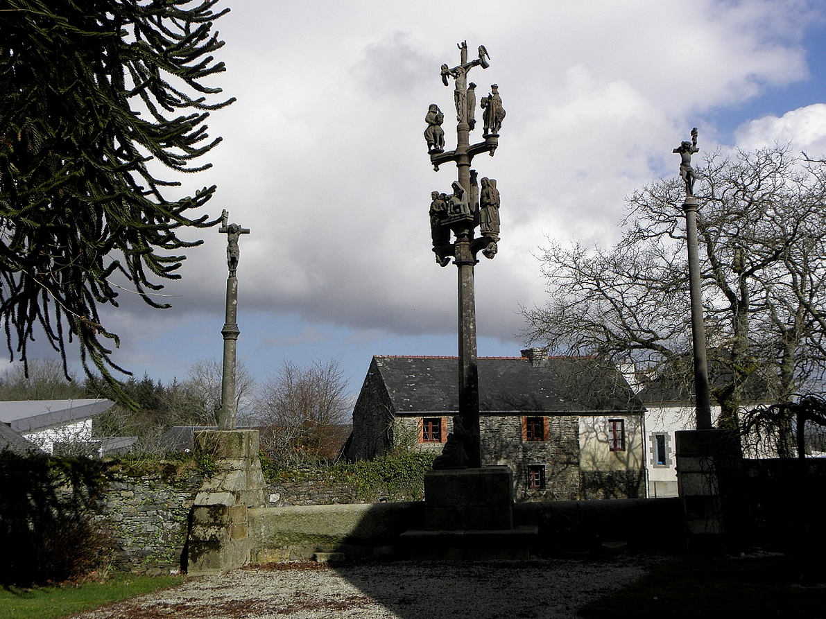 Calvaire nord de l'enclos paroissial de Pencran (29).